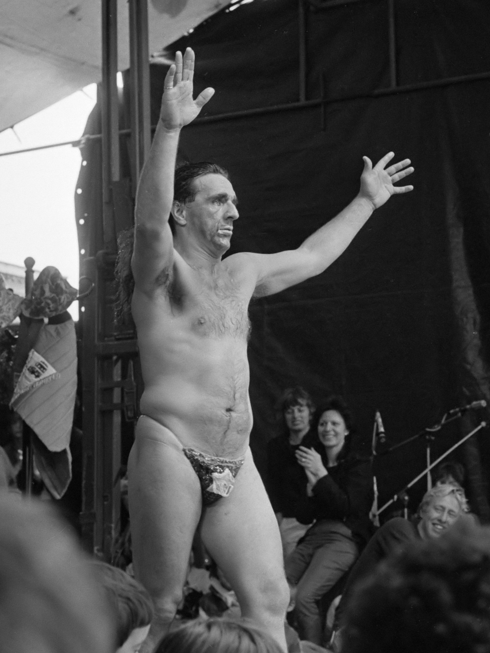 Laatste weekend Festival of Fools in Amsterdam; Jango Edwards tijdens optreden op Noordermarkt 16 juni 1984